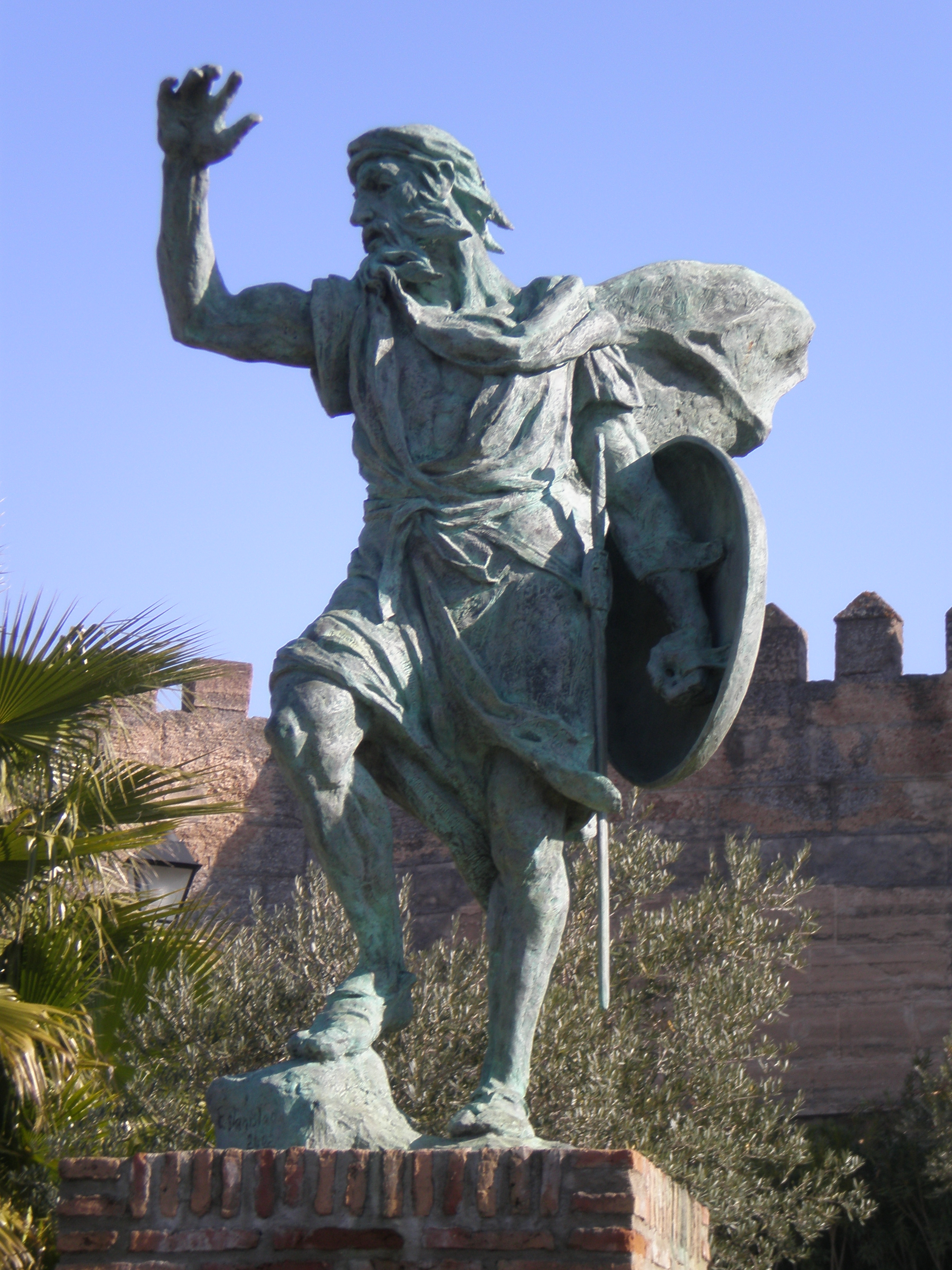 Own work